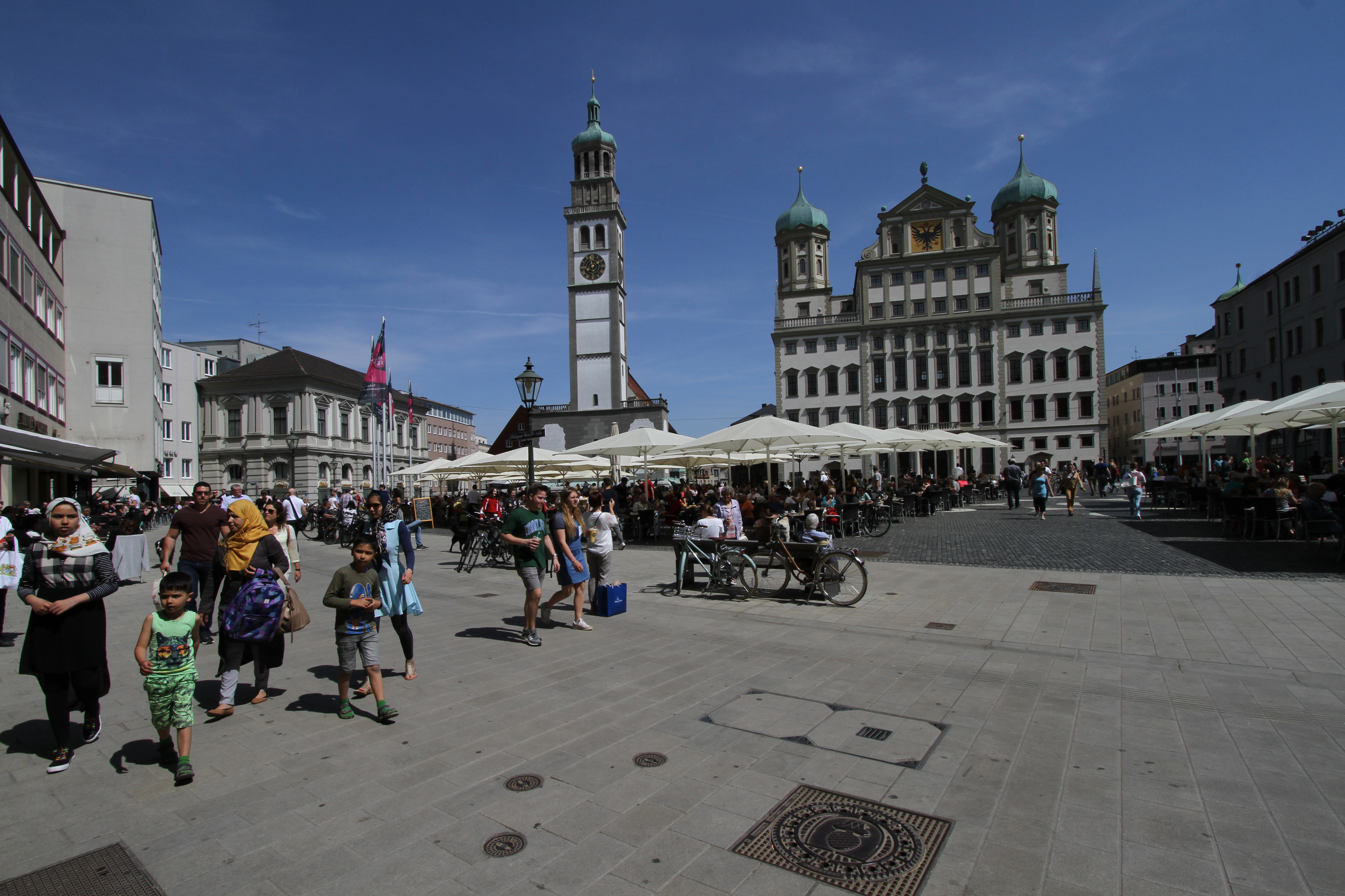 Rathausplatz mit Perlachturm und Rathaus in Augsburg